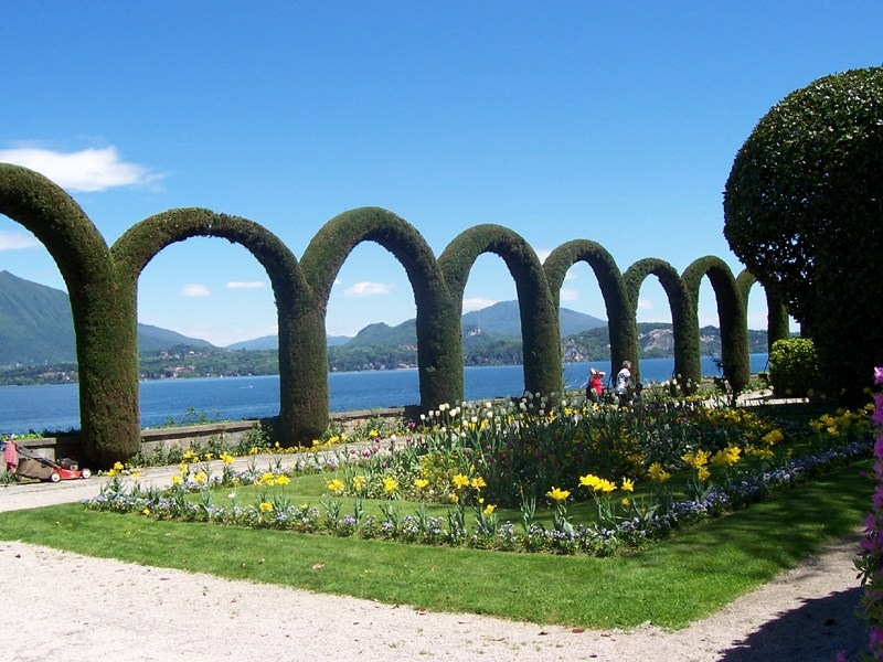 Stresa - Parco di Villa Pallavicino